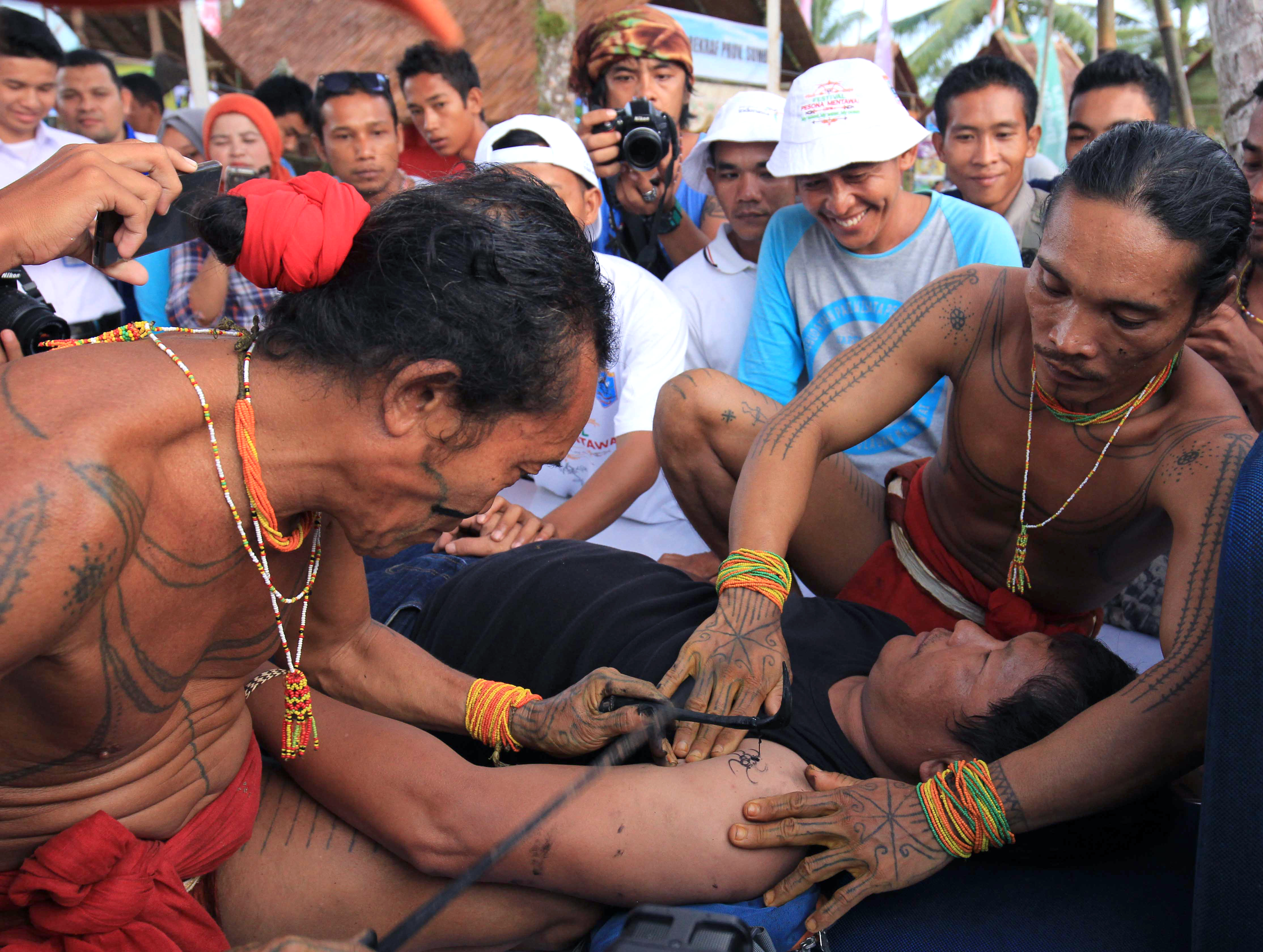 Penato tradisional Mentawai dari Pulau Siberut sedang mempraktikan cara menato kepada seorang lelaki Mentawai pada Festival Pesona Mentawai di Mapadeggat, Tuapejat, ibukota Kabupaten kepulauan Mentawai, Sumatera Barat 20 April 2016. Orang Mentawai sedikit suku di Indonesia yang memiliki tato tradisional di sekujur tubuh dan masih bertahan di pedalaman Pulau Siberut.